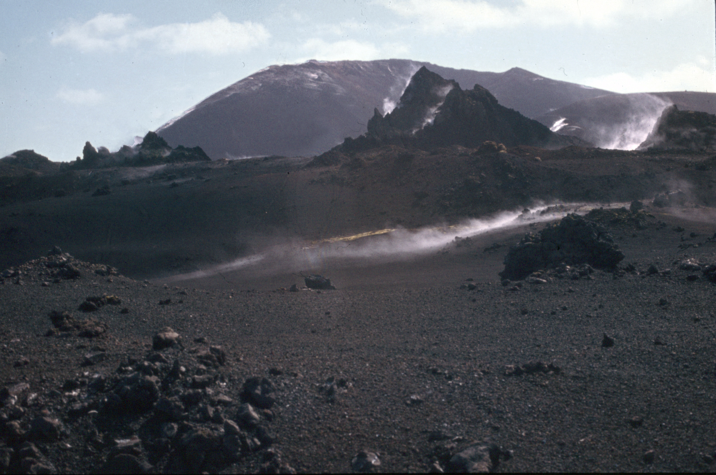 Heimaey